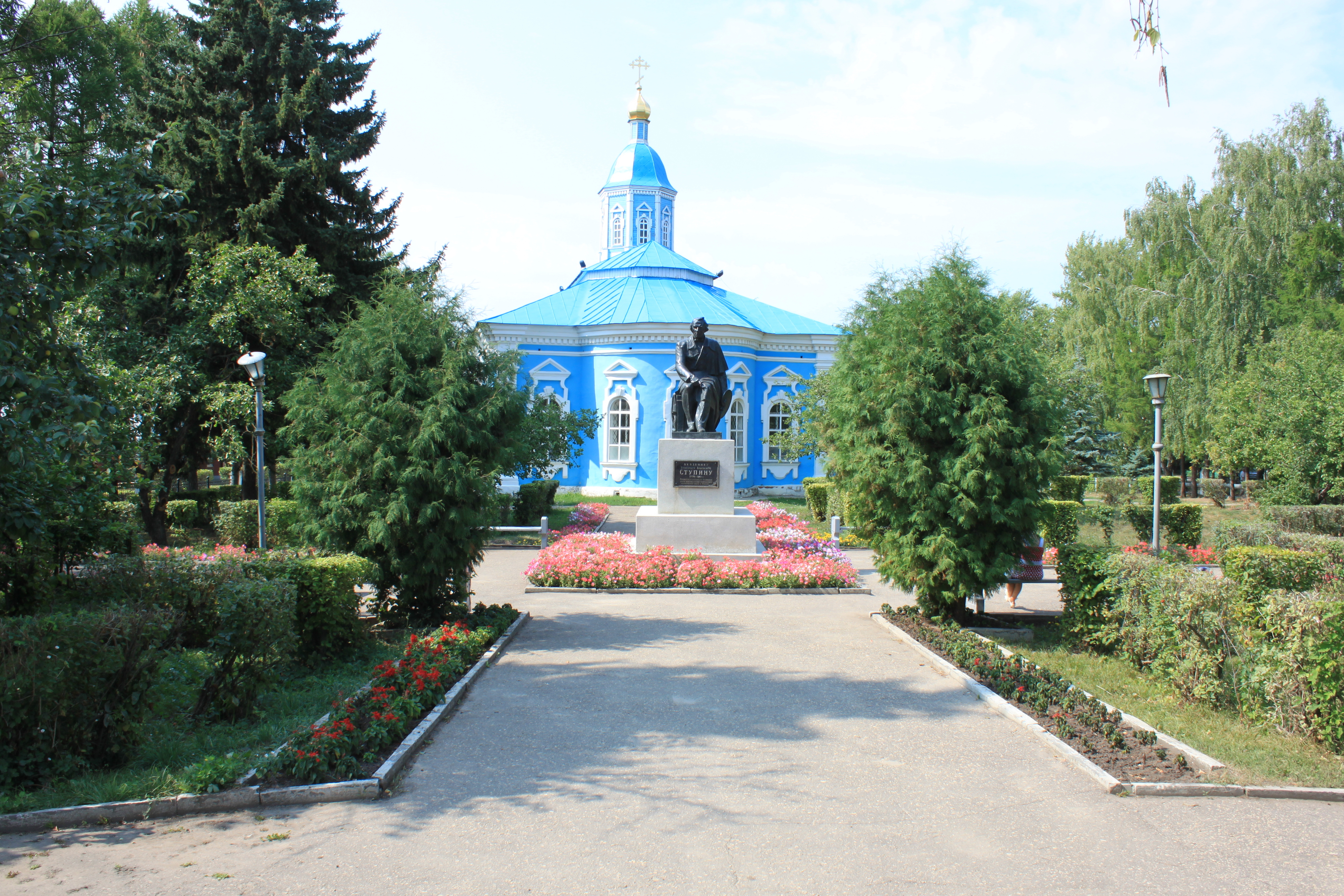 Ступин, Александр Васильевич